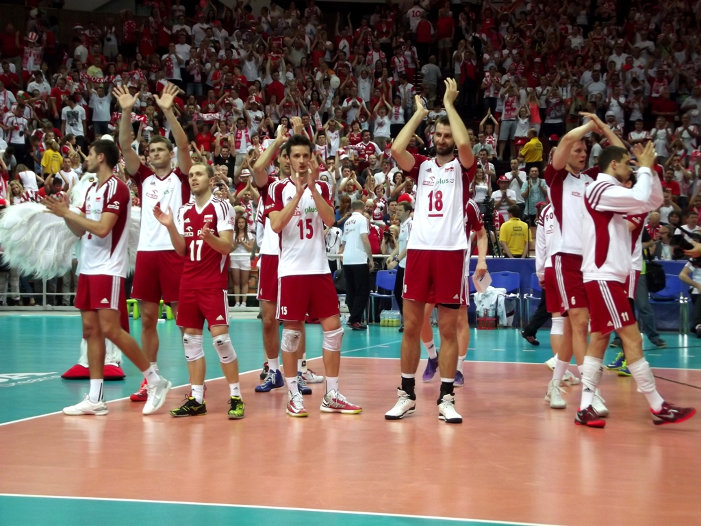 Zdjęcie zrobione podczas meczu Polska - USA siatkarskiej Ligii Światowej w katowickim Spodku.